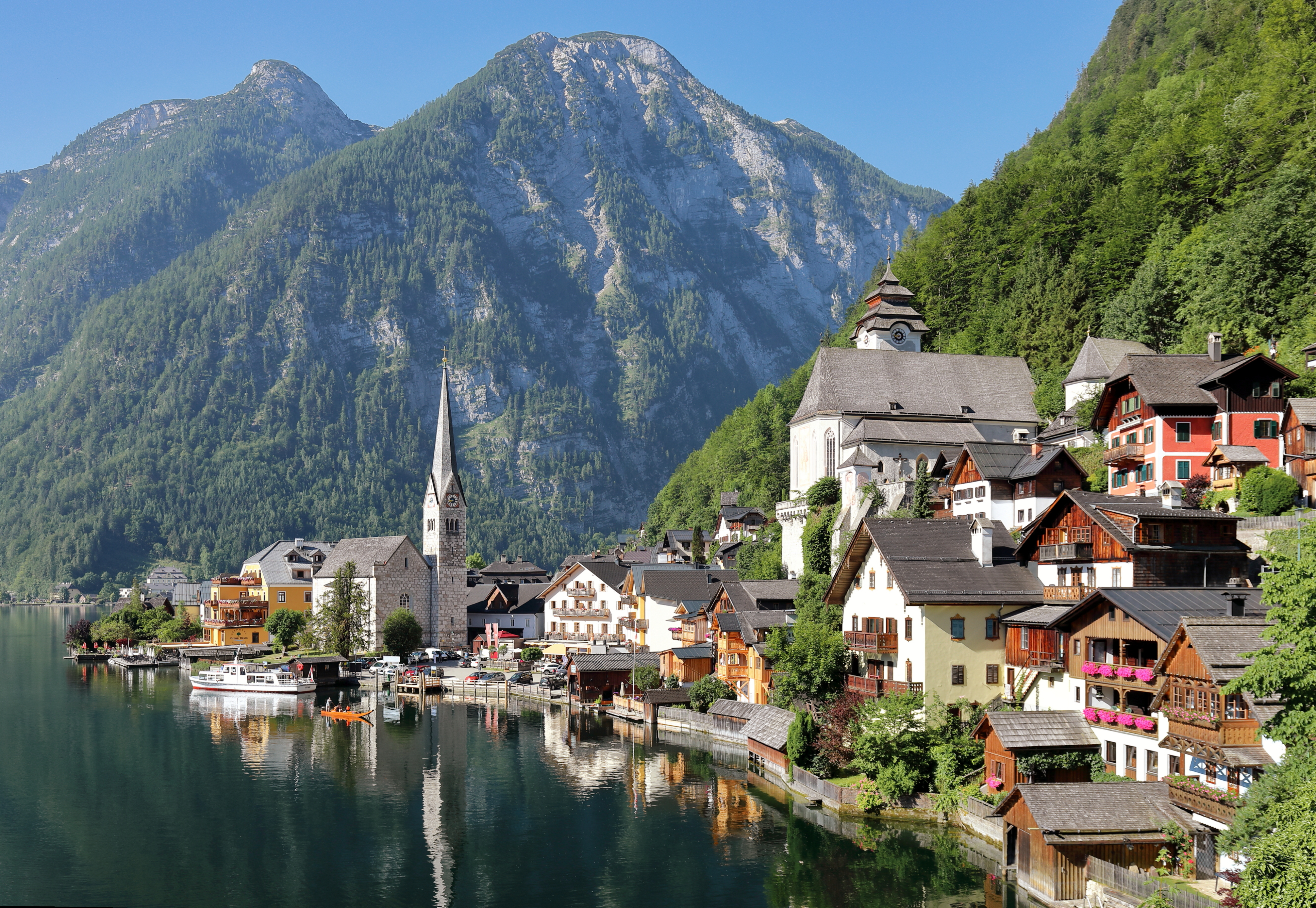 Nordansicht des Ortszentrums der oberösterreichischen Marktgemeinde Hallstatt und im Hintergrund der 1934 m hohe Vordere Hirlatz.